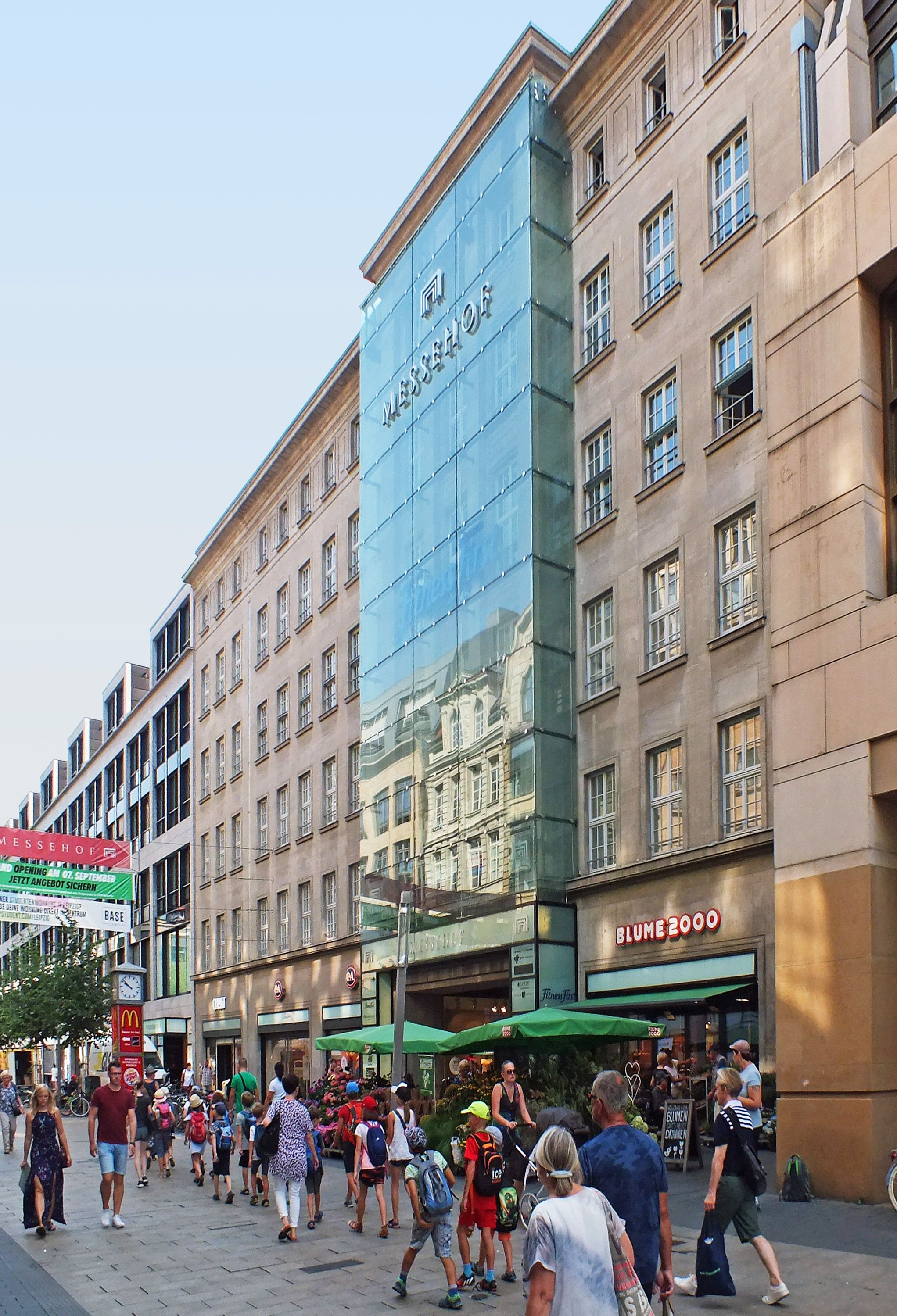 Ehemaliges Messehaus Messehof in Leipzig, Seite zur Petersstraße